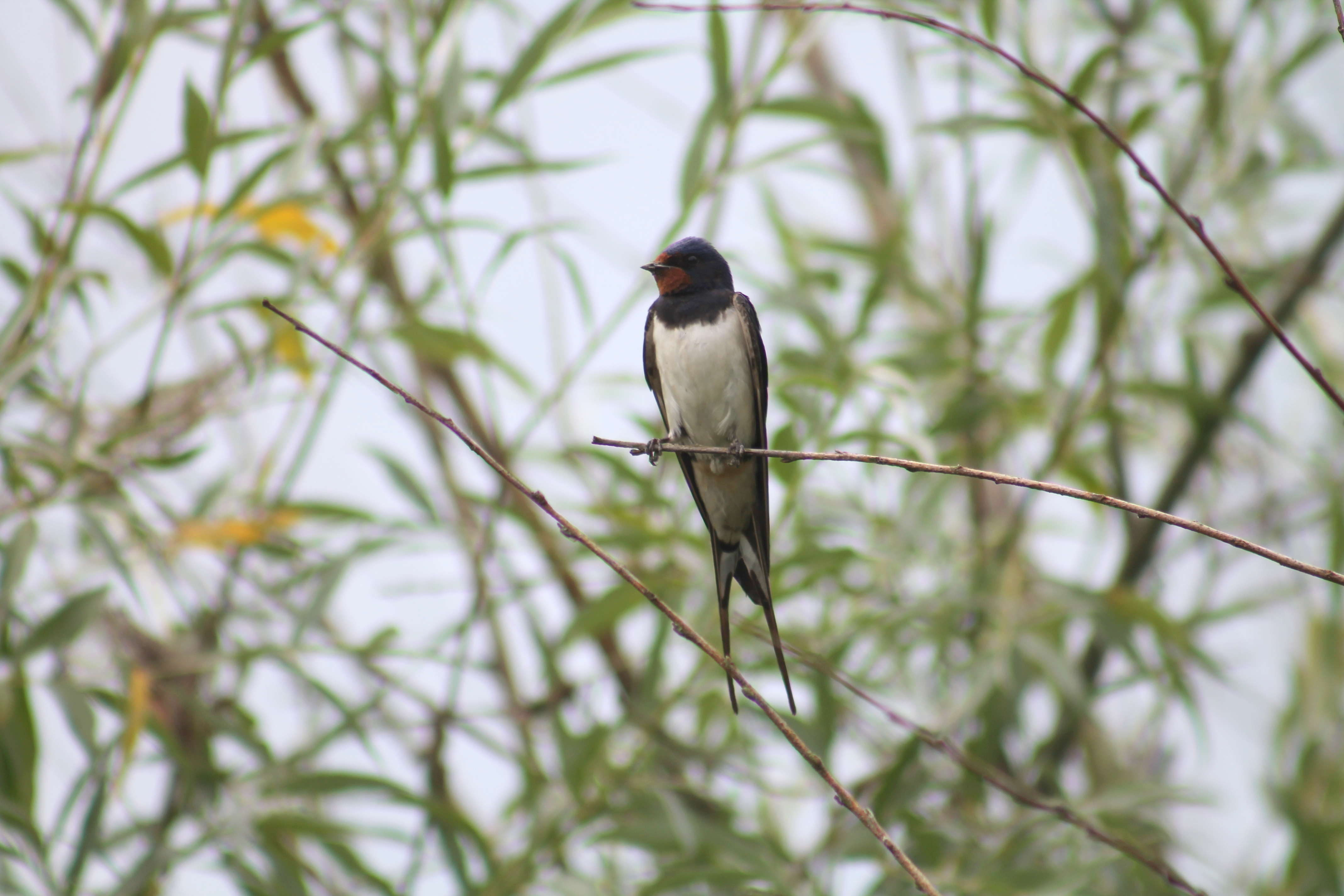 boerenzwaluw in de Oostvaardersplassen